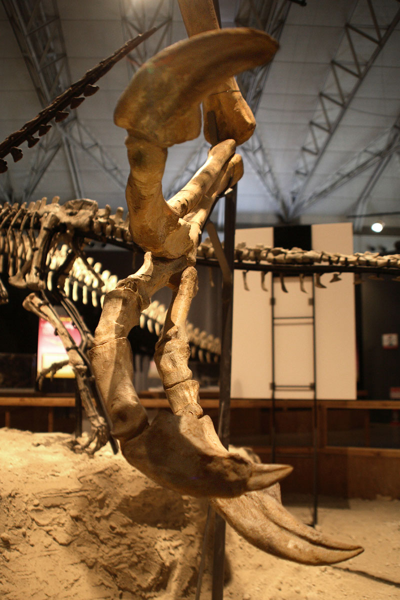 Deinocheirus - 01